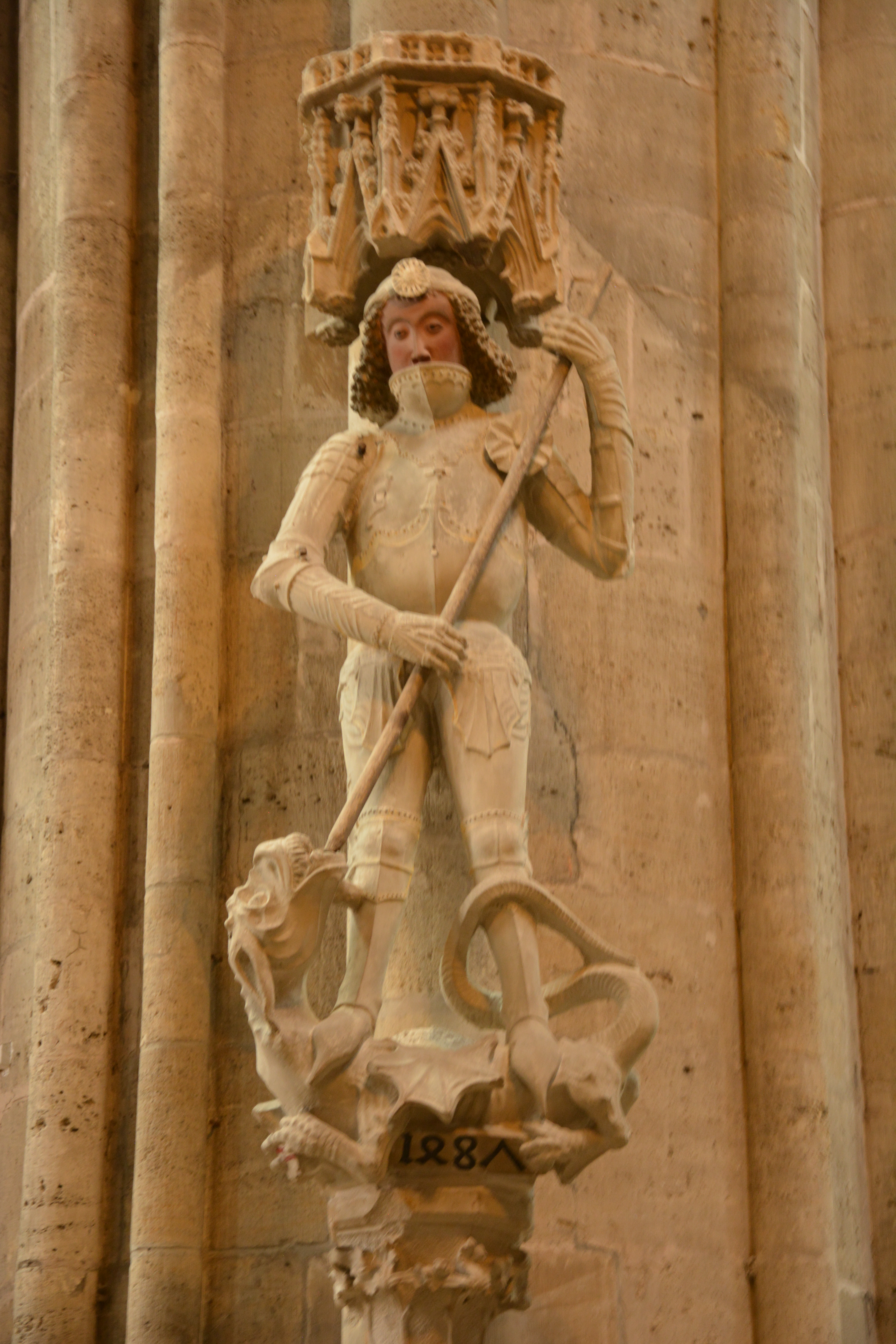 Heiliger Georg am Vierungspfeiler des Halberstädter Doms (mit Mundschutz)